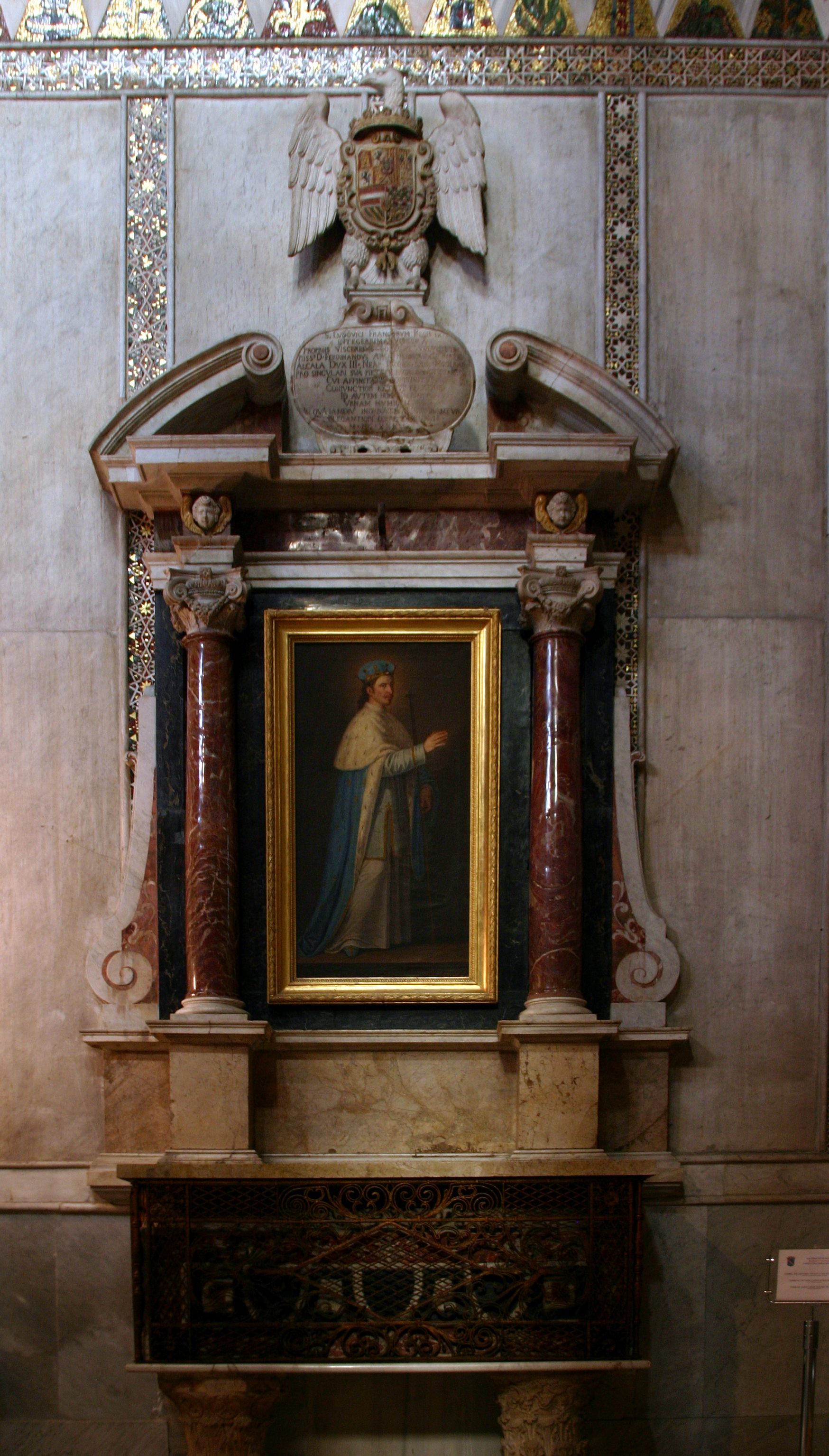 Cathedral of Monreale